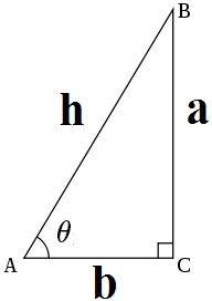 直角三角形中定义三角函数